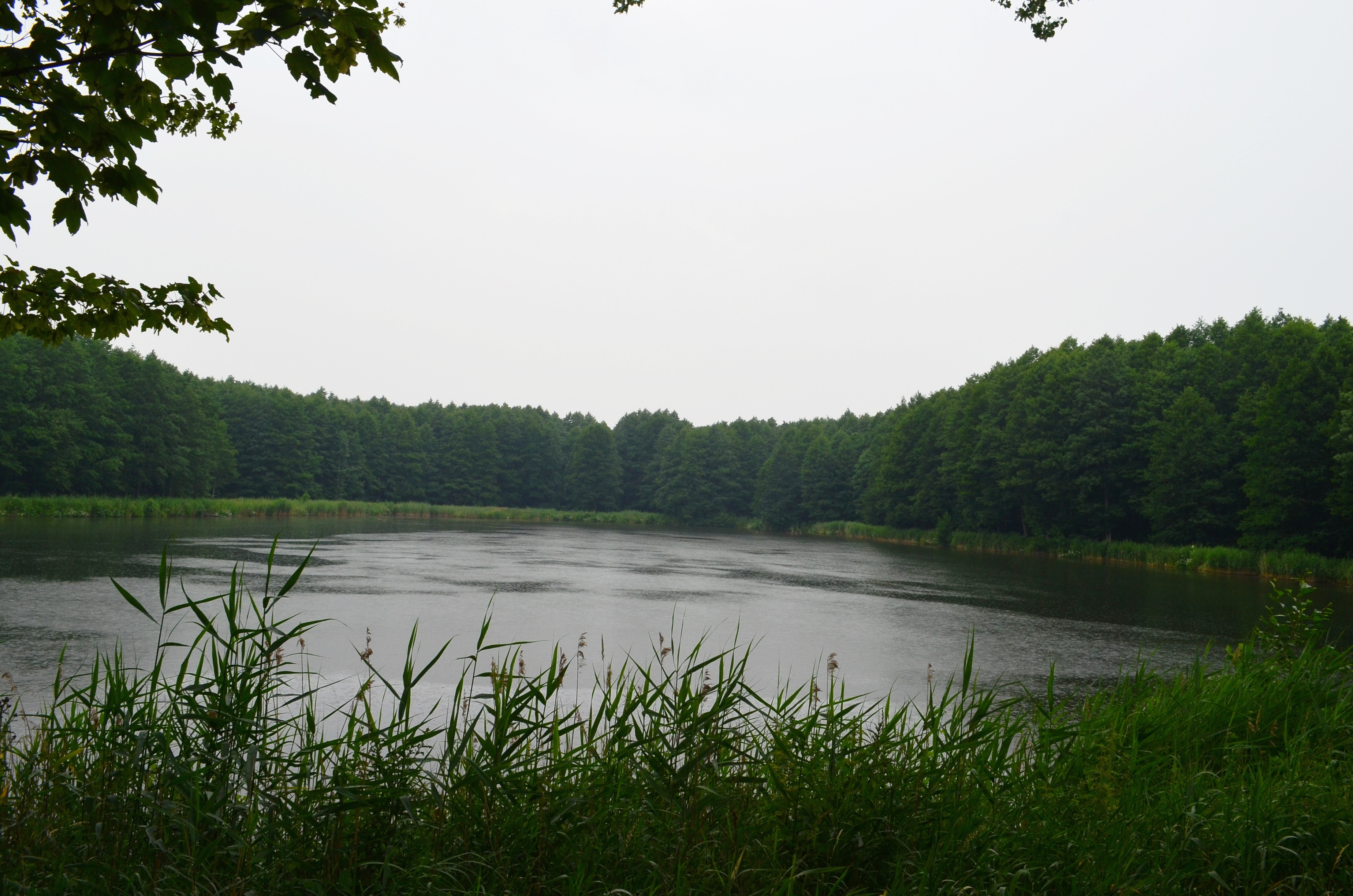 Šereitlaukio tvenkinys, Pagėgių sav.